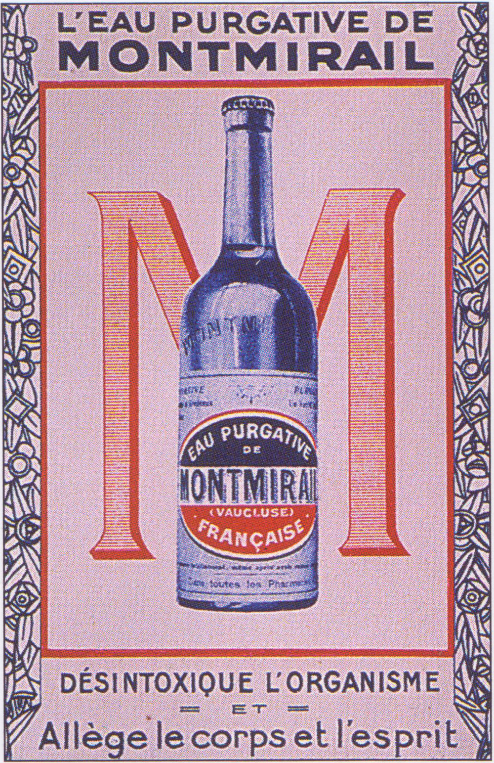 Source de Montmirail à Gigondas